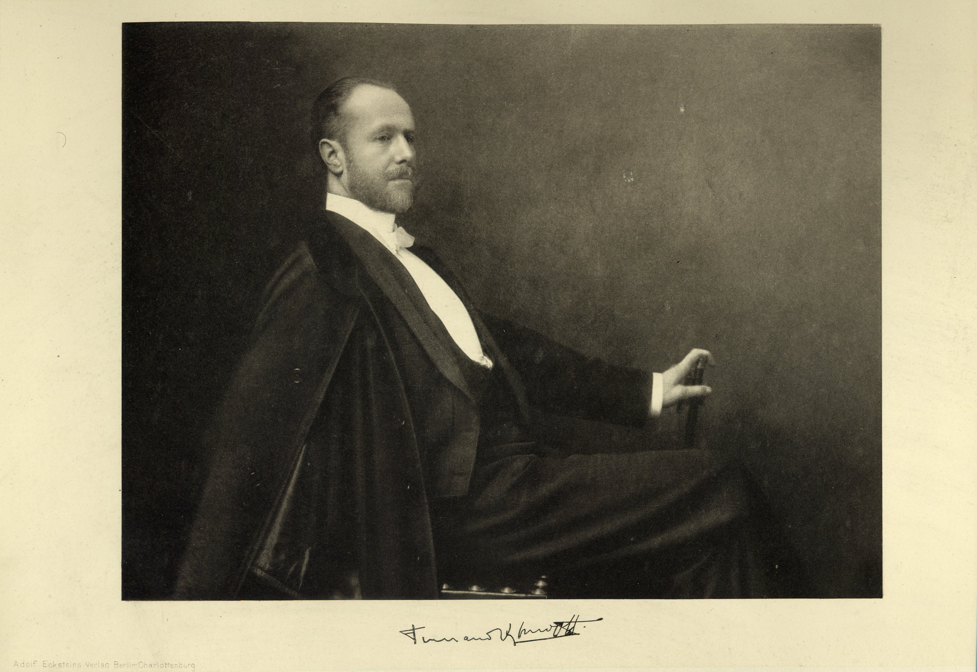 Portrait de Fernand Khnopff vers 1900 paru dans "La Belgique d'aujourd'hui", sous la direction de Gustave DELTOUR, Berlin-Charlottenburg, Adolf Eckstein, vers 1908.